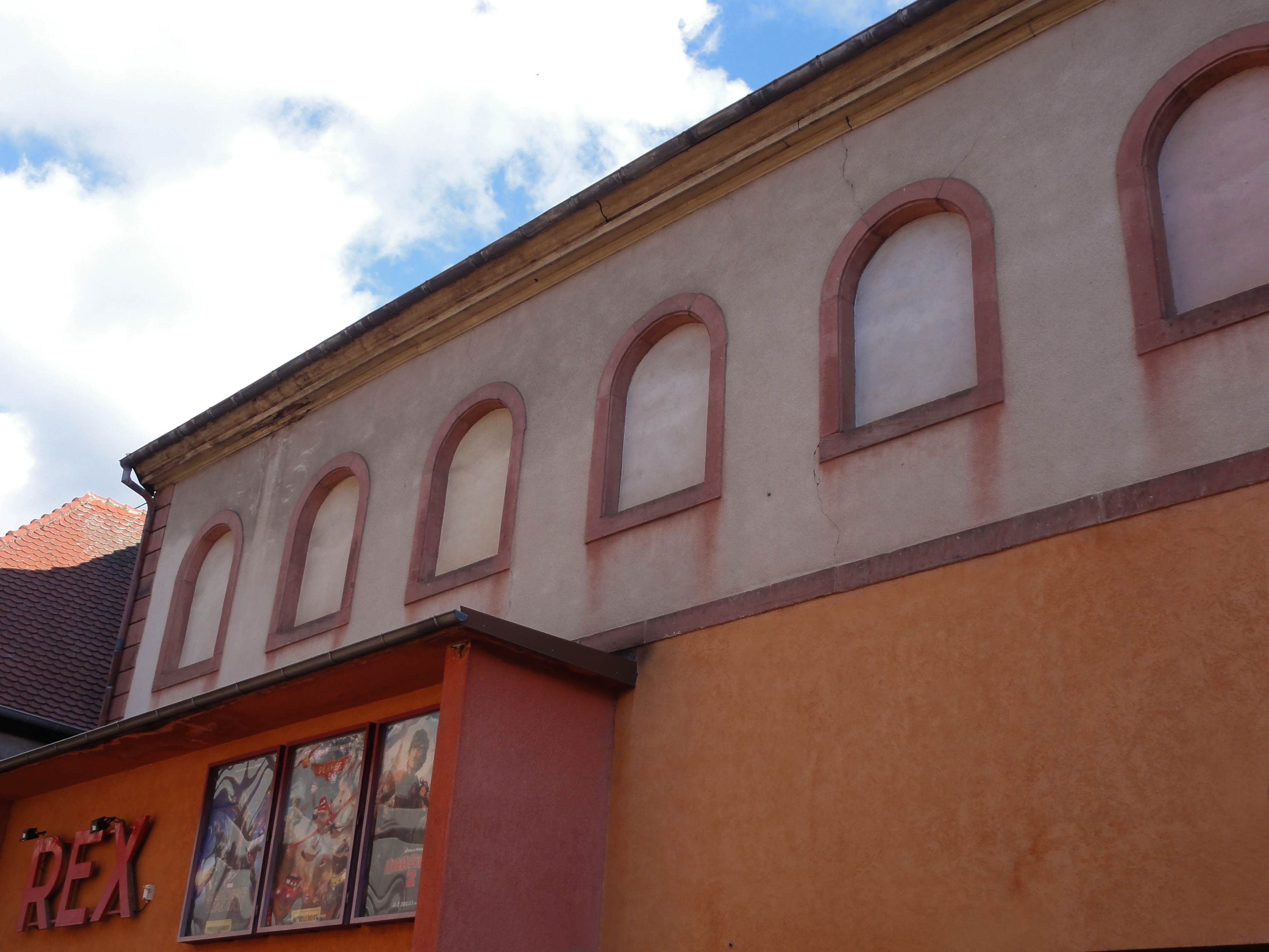 Alsace, Haut-Rhin, Ribeauvillé, Ancienne synagogue, actuellement salle de cinéma, rue de la Synagogue.